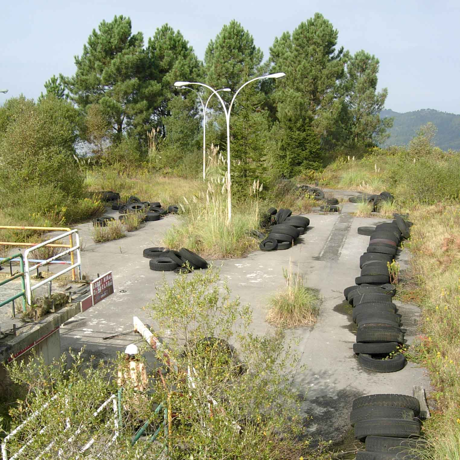 Circuito Pista Karts Parque de Atracciones de Vizcaya